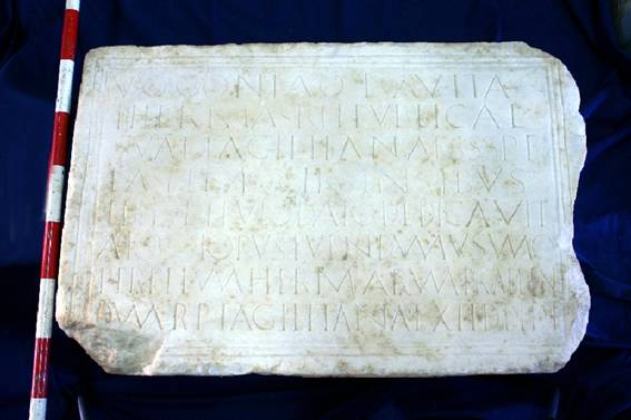 LAPIDA DE VOCONIA AVITA en Armuña de Almanzora (Almería) AE 1979, 352: Voconia Q(uinti) f(ilia) Avita/ thermas rei publicae/ suae Tagilitanae s(olo) s(uo) s(ua) p(ecunia) f(ecit)/ easdemque circensibus/ editis et epulo dato dedicavit/ a quo opus tuendum usumq(ue)/ perpetuum thermarum praebandum/ r(ei) p(ublicae) Tagilitanae d(enariorum) II(milia)D dedit Hispania Epigraphica 17